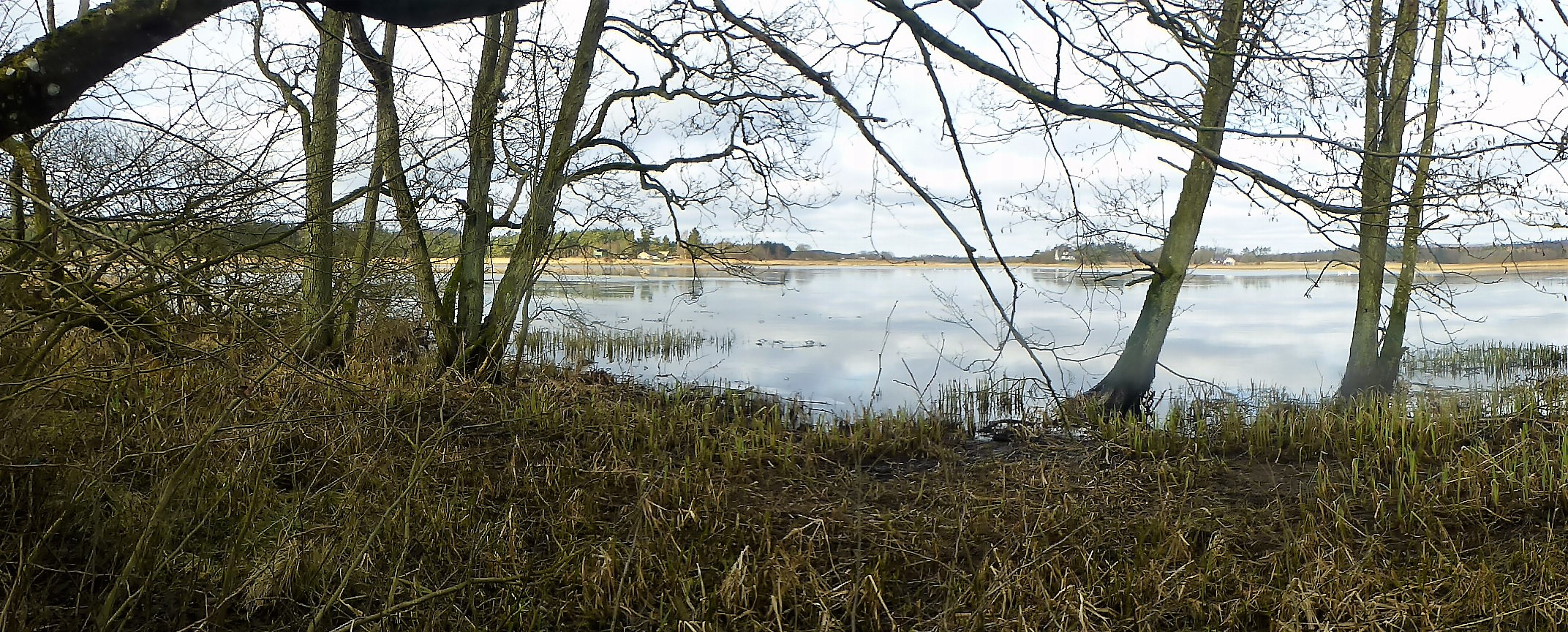 Sminge Sø set mod nord